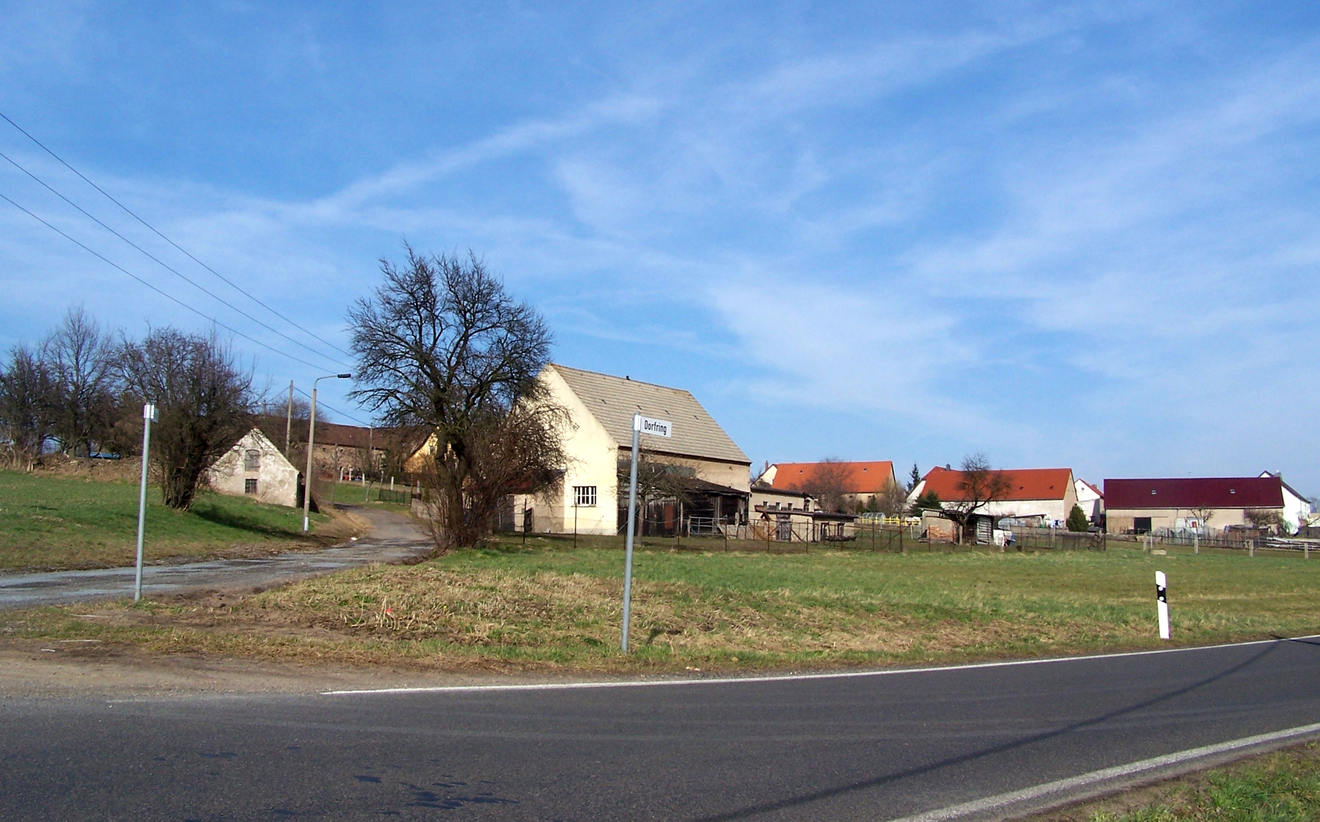 Dorfring Leckwitz, Gemeinde Nünchritz, Landkreis Meißen